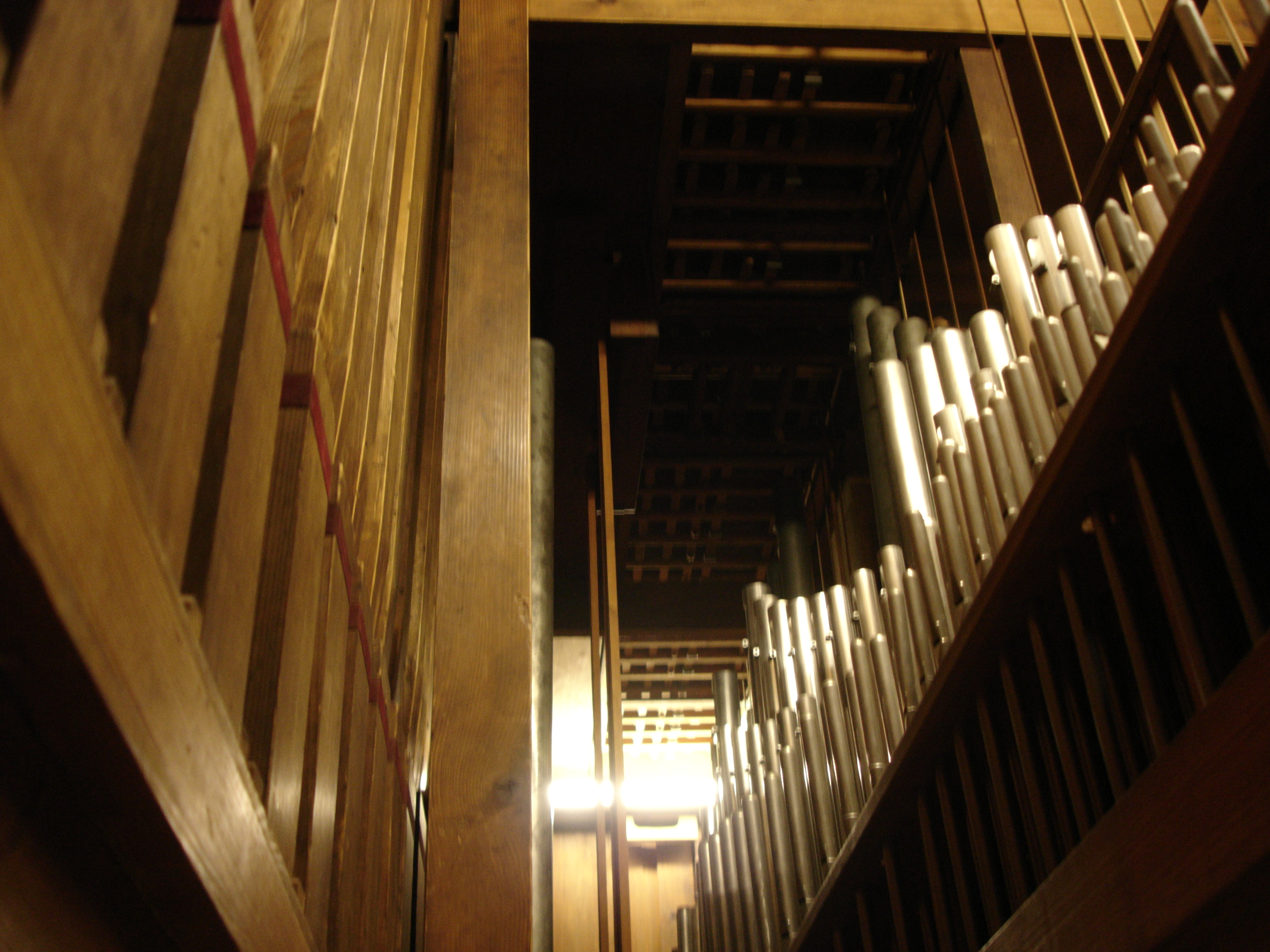 St. Marien Hof, Steinmeyer-Orgel